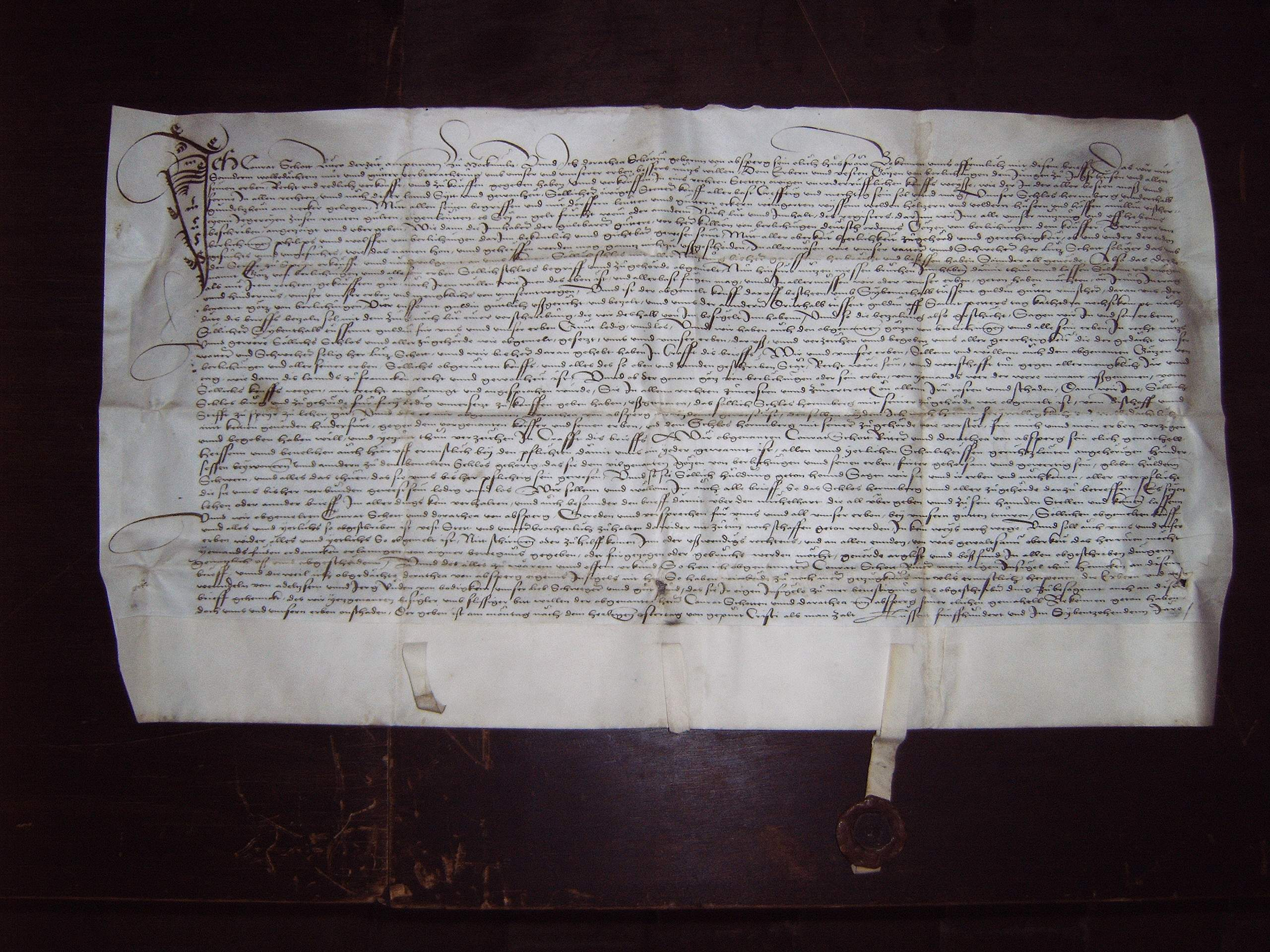 Kaufbrief des Götz von Berlichingen über Burg Hornberg 1517, Transskription. Archiv Burg Hornberg.